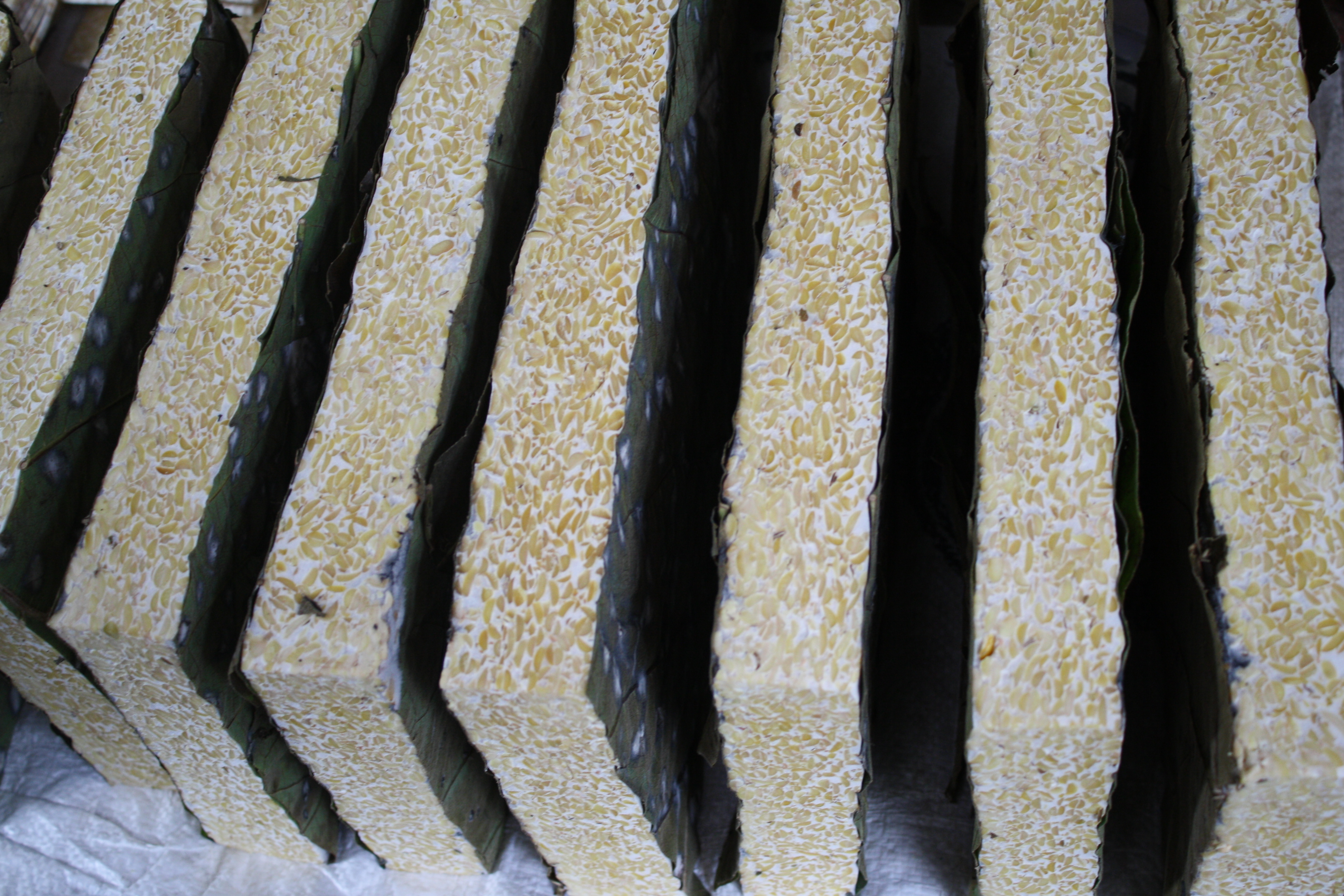 Tempe bungkus daun jati